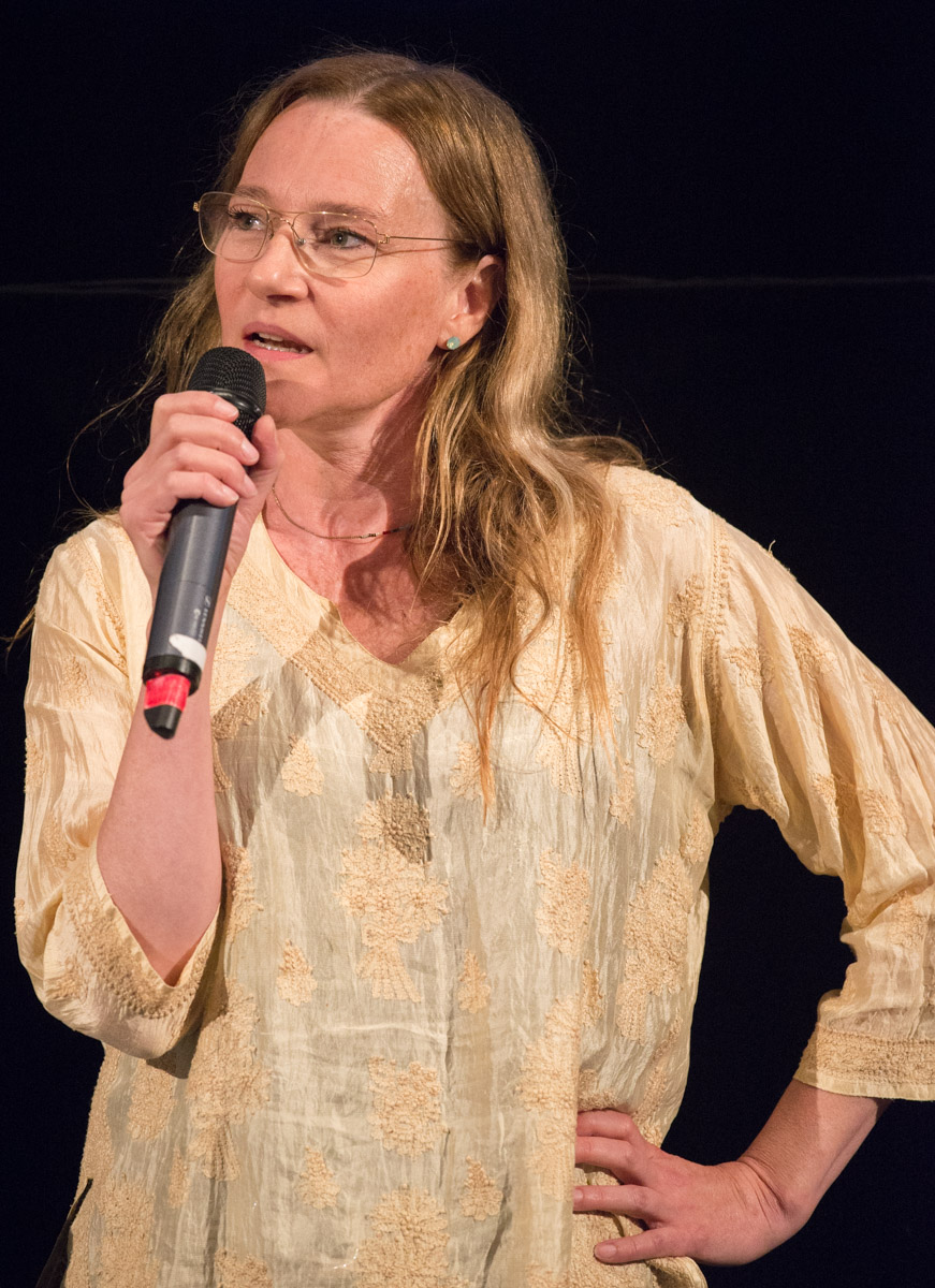 Annika Hallin under presentationen av den Svenska filmhösten i Filmhuset i Stockholm den 17 augusti 2015.